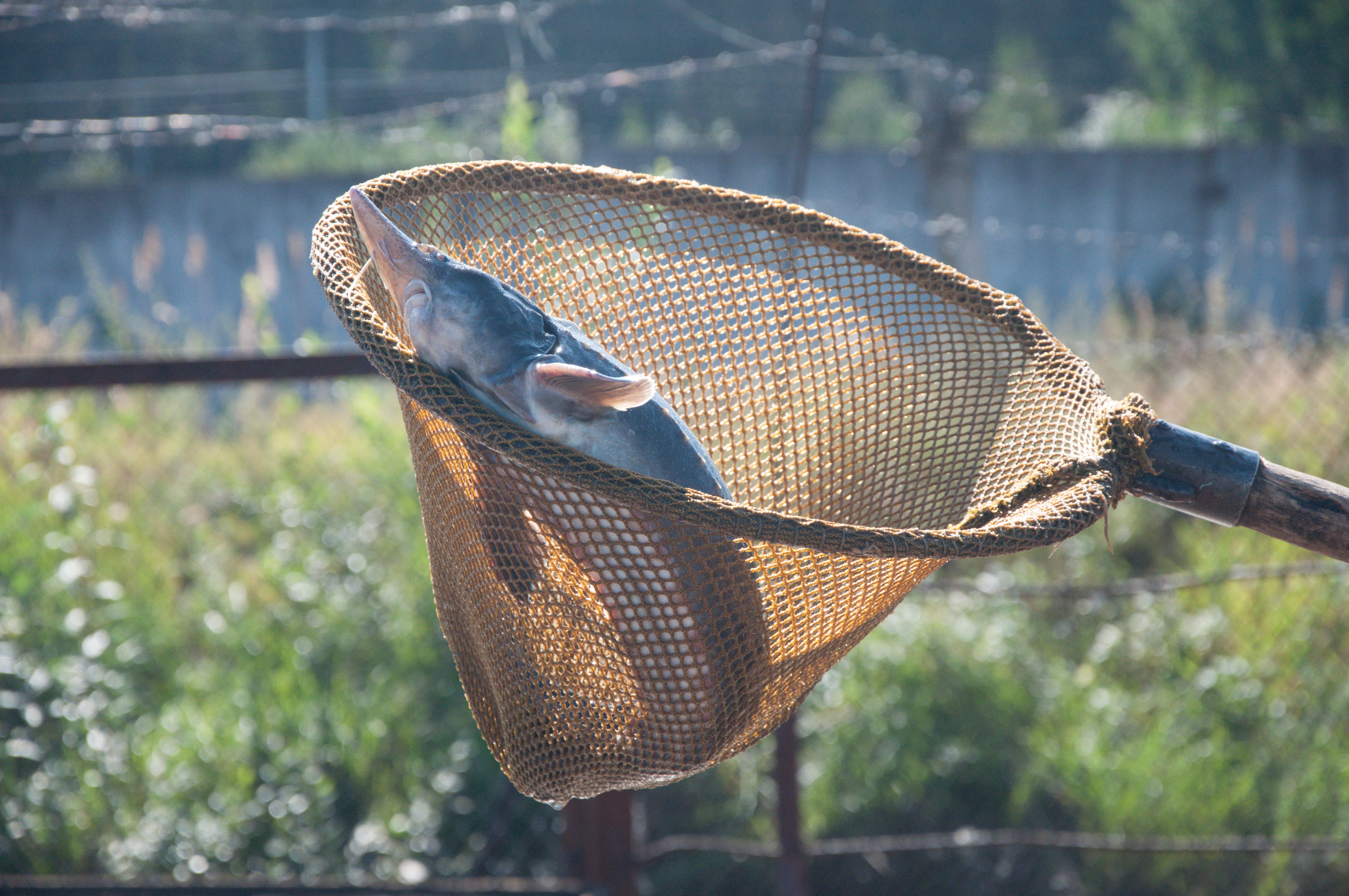 Осетр в сачке